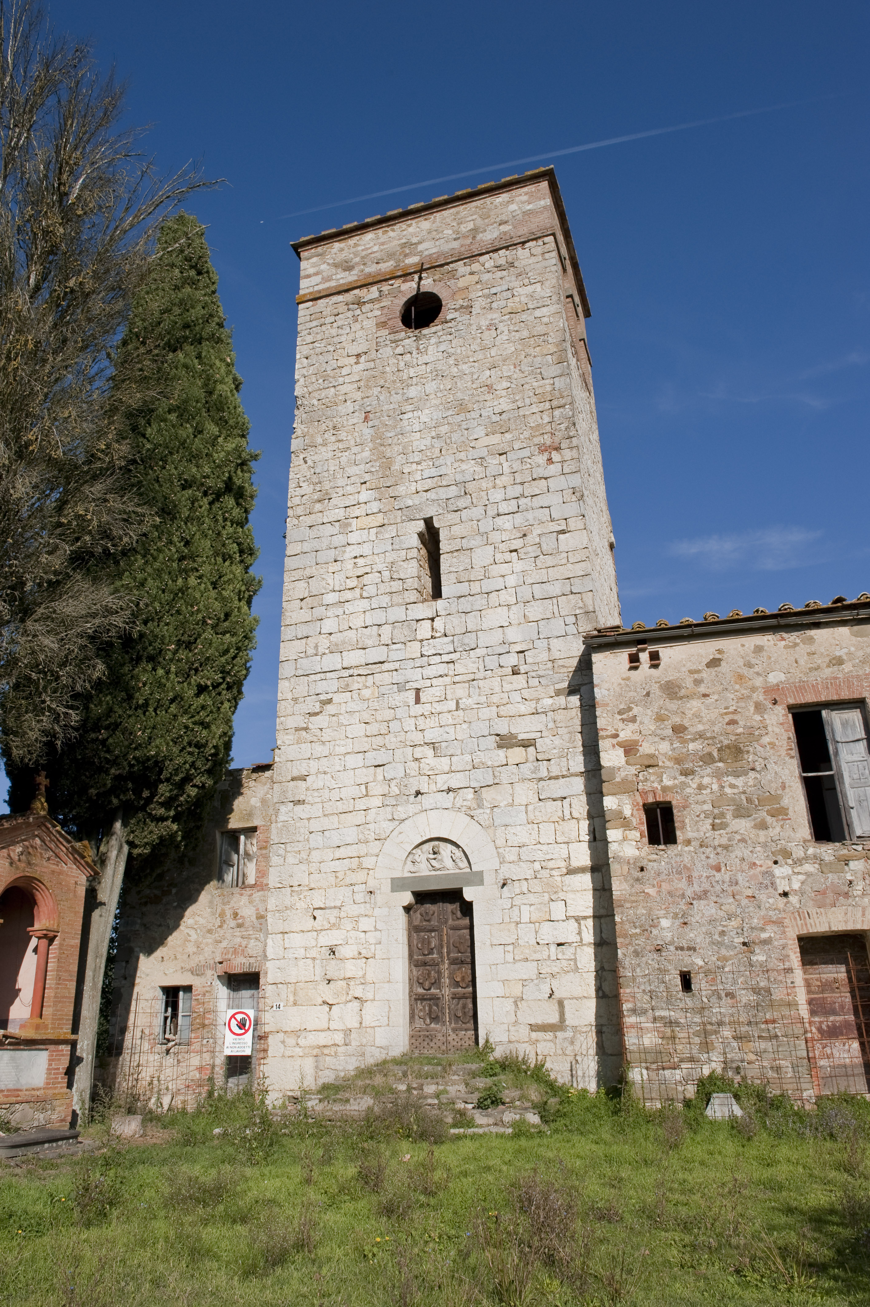 Campanile della pieve di San Giovanni Battista a Pievasciata